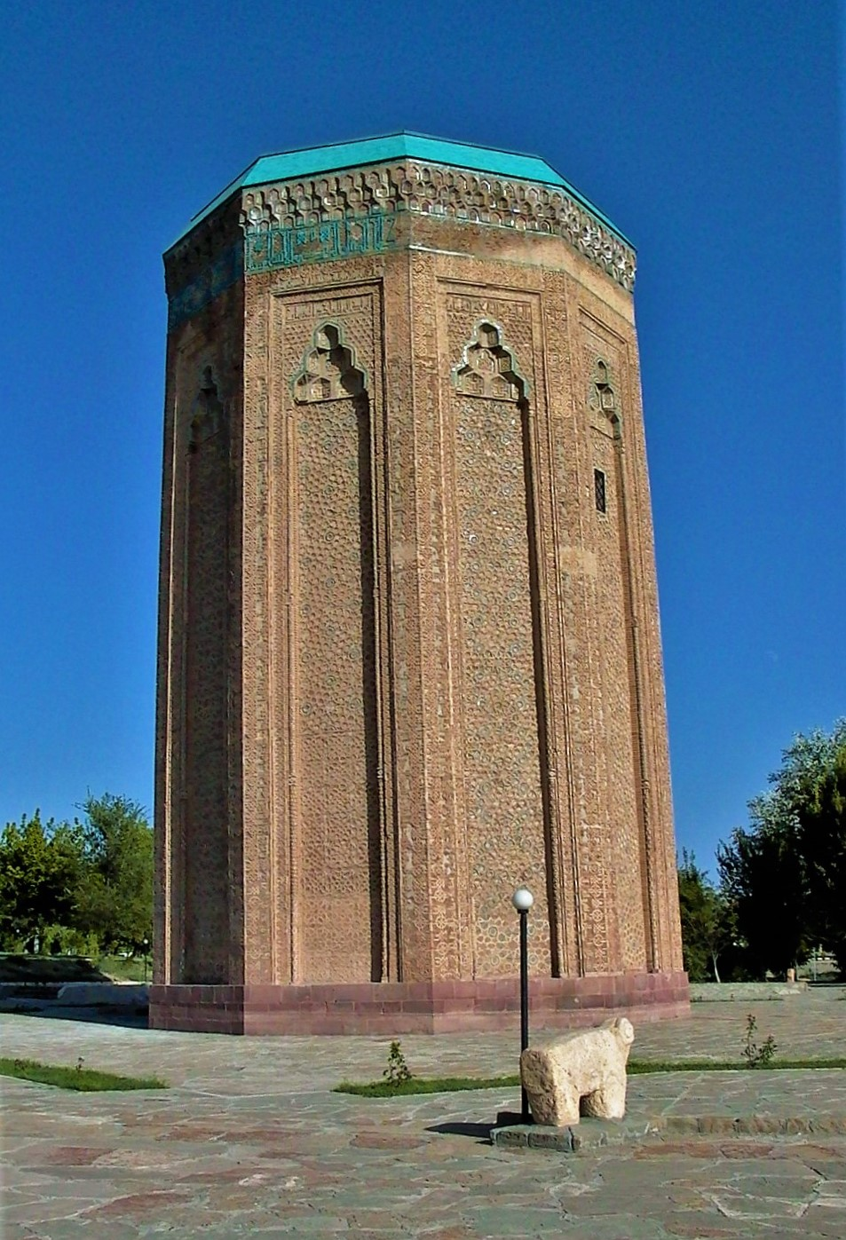 Nakhichevan, Azerbaijan